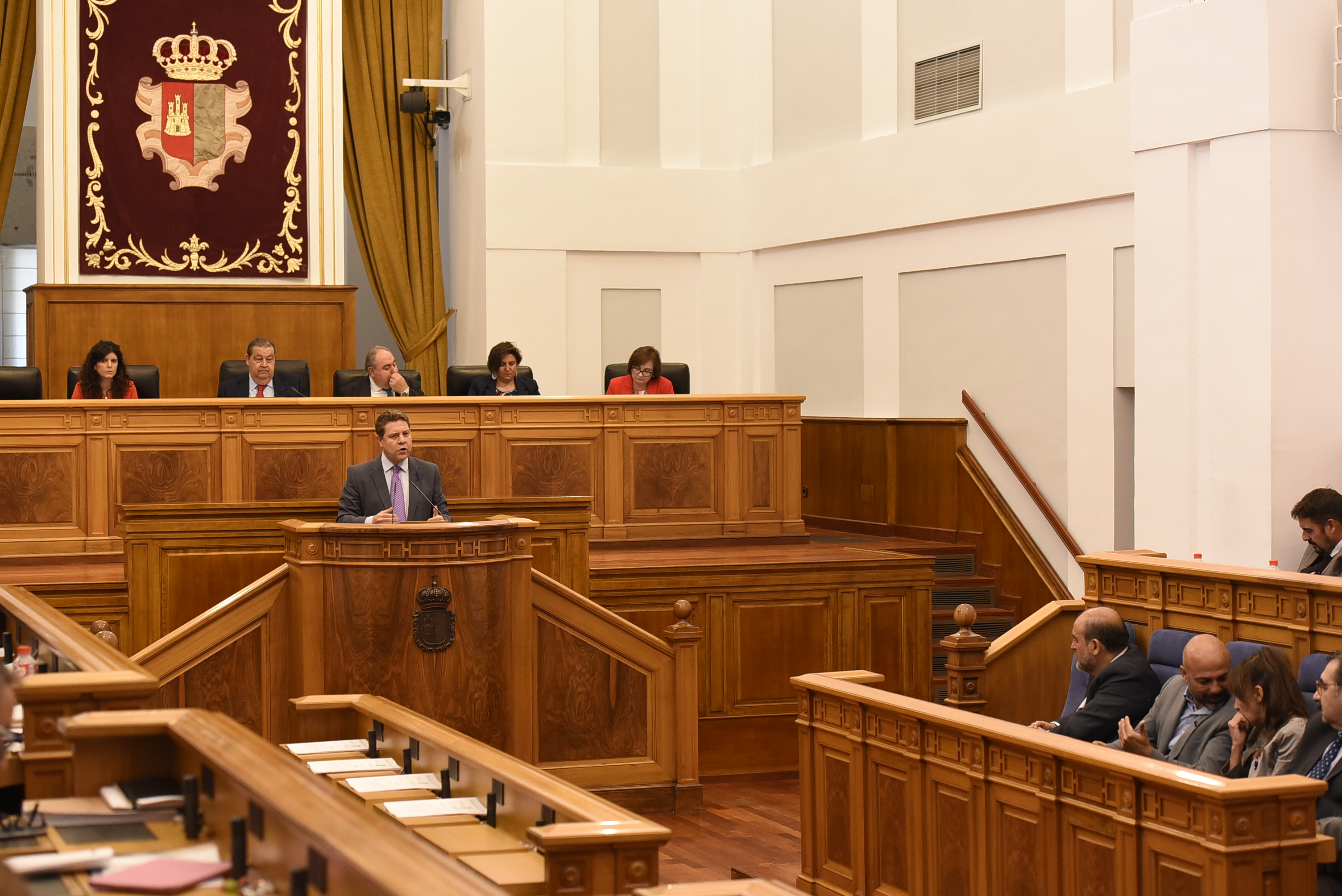 Toledo, 4 de octubre de 2018.- El presidente de Castilla-La Mancha, Emiliano García-Page, interviene desde la tribuna en el Pleno de las Cortes regionales, en el que se debate sobre el Proyecto de Ley para una Sociedad Libre de Violencia de Género en Castilla-La Mancha. (Fotos: José Ramón Márquez // JCCM)